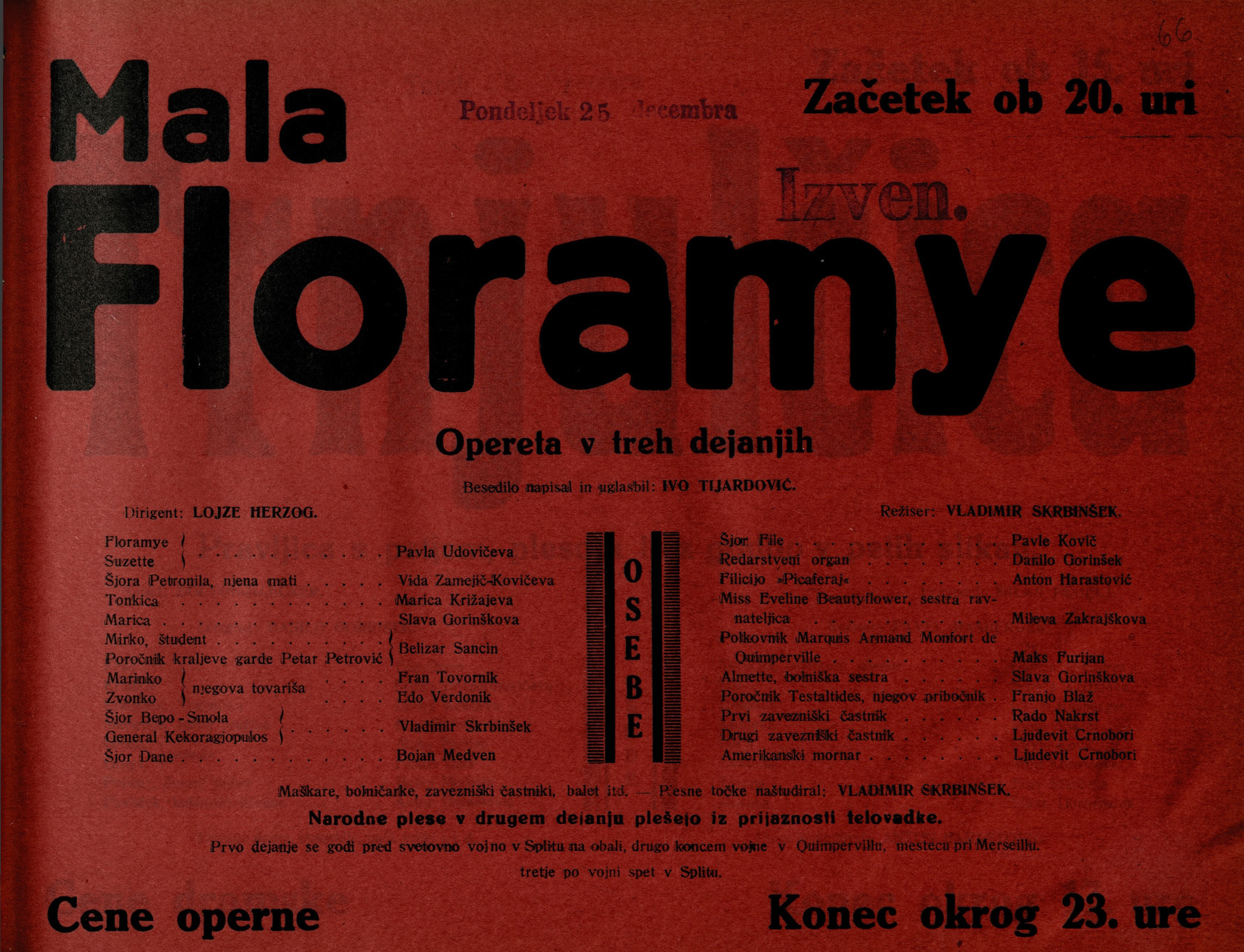 Plakat za predstavo Mala Floramye v Narodnem gledališču v Mariboru.